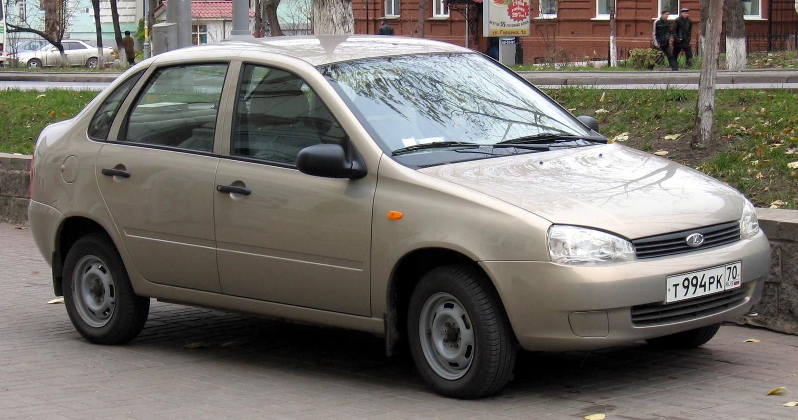 Photo taken in Tomsk, Russia